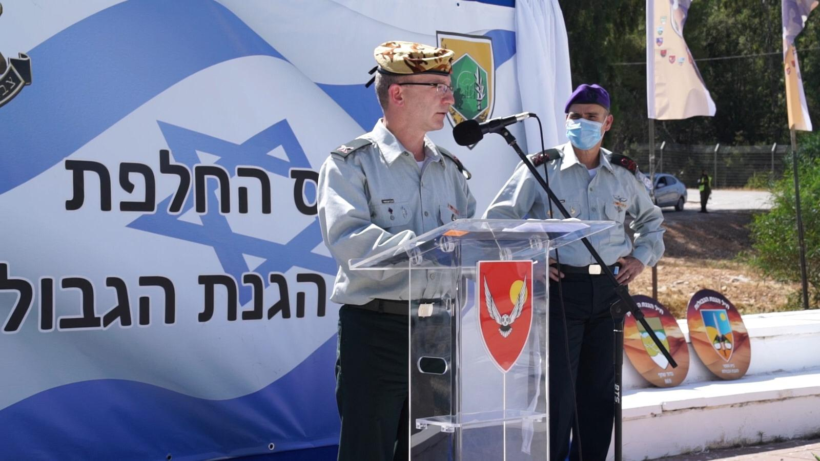 טקס חנוכת חיל הגנת הגבולות החדש בזרוע היבשה. הטקס התקיים במחנה עופר, וציין את המעבר הרשמי של מערך הגנת הגבולות לחיל חדש בזרוע היבשה. הטקס התקיים בראשות מפקד זרוע היבשה, אלוף יואל סטריק, ומפקד חיל הגנת הגבולות, תא״ל אמיר אבשטיין.